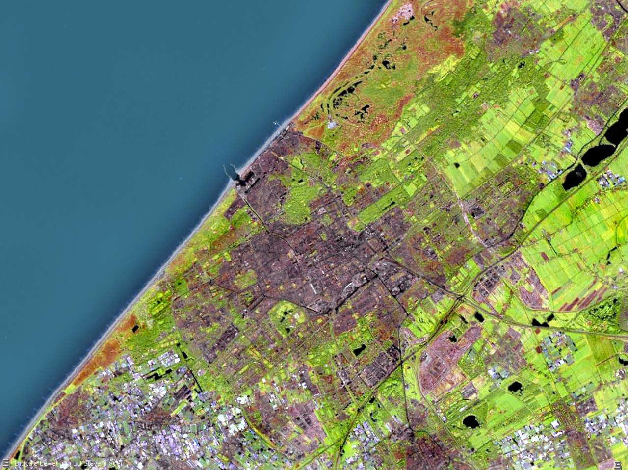 Satellietfoto van Den Haag, Scheveningen, Monster, 's-Gravezande, Loosduinen, Delft, Pijnacker, Nootdorp, Leidschendam, Voorburg, Voorschoten, Wassenaar.